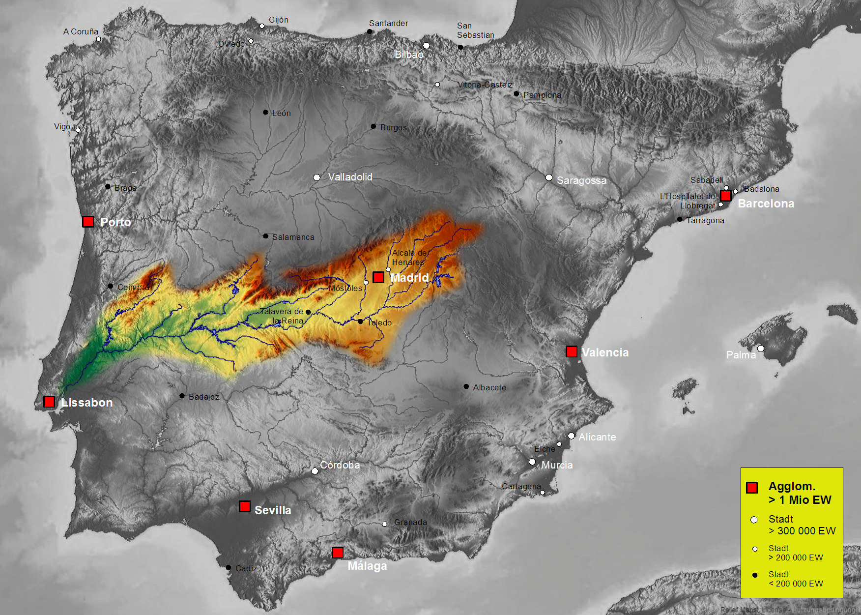 Map of Tajo river basin in Spain, Karte des hydrogeografischen Beckens des Tajo